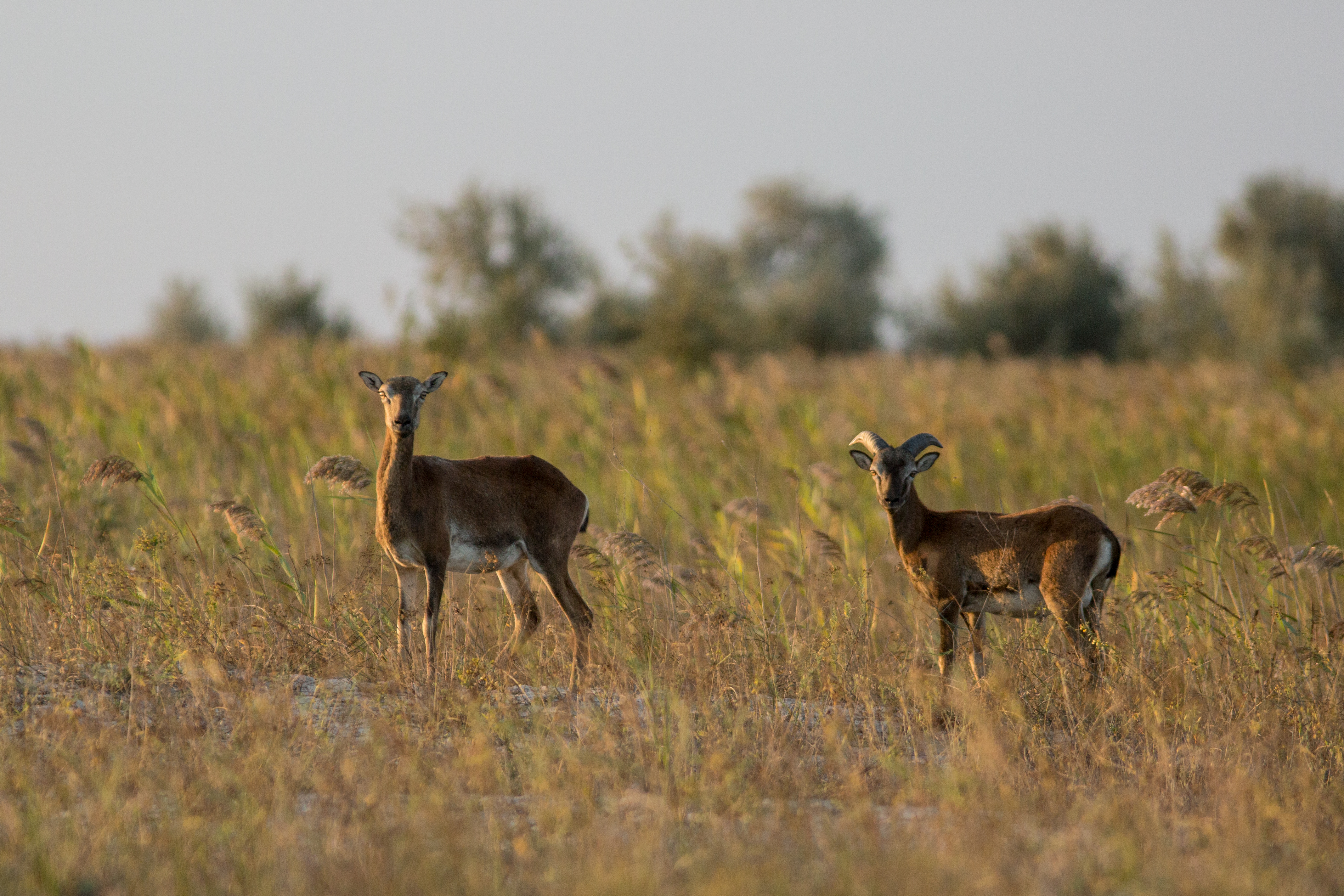 Знято під час експедиції на о. Джарилгач This photo/video of Dzharylhach was taken during Wikiexpedition to Dzharylhach supported by Wikimedia Ukraine. You can see all photographs in category Category:Wikiexpedition to Dzharylhach. English | українська | +/−